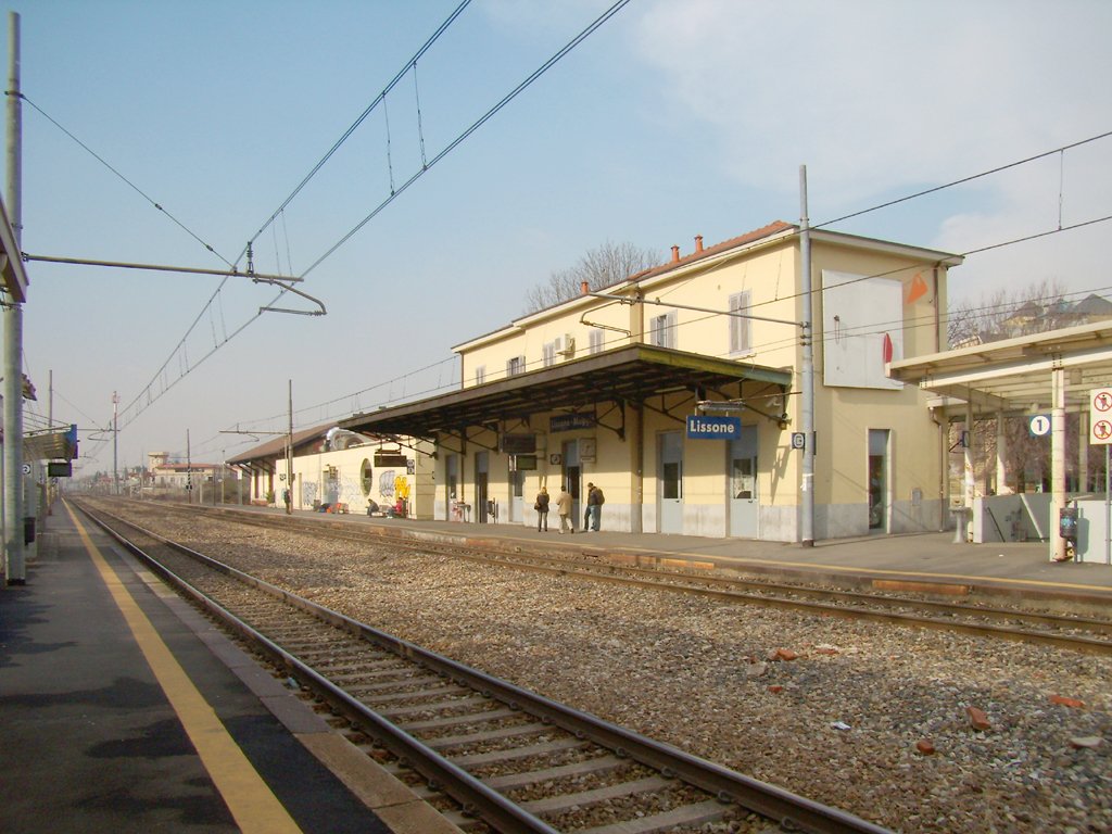 La stazione ferroviaria di Lissone-Muggiò